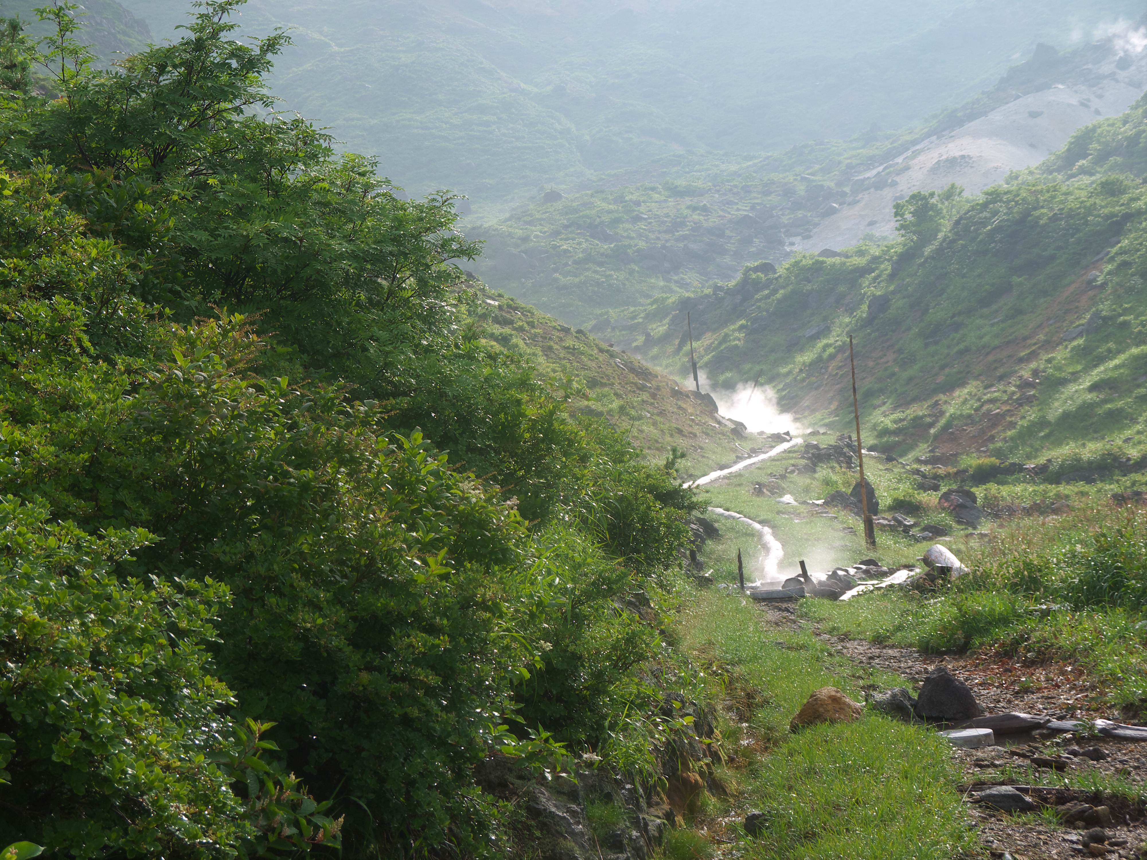 元岳温泉跡地